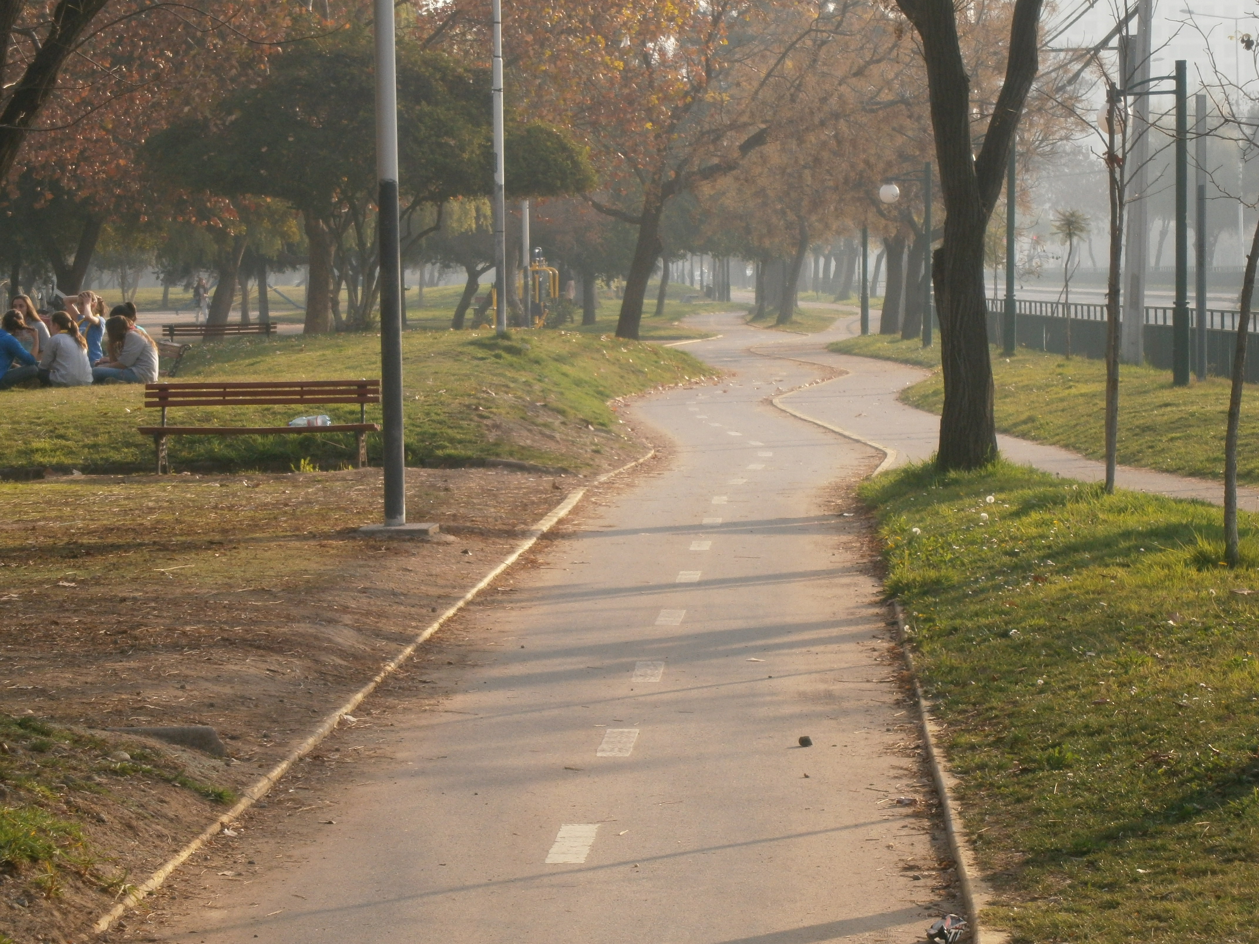 Ciclovía al sur de Avenida Grecia, en la comuna de Ñuñoa, Santiago de Chile